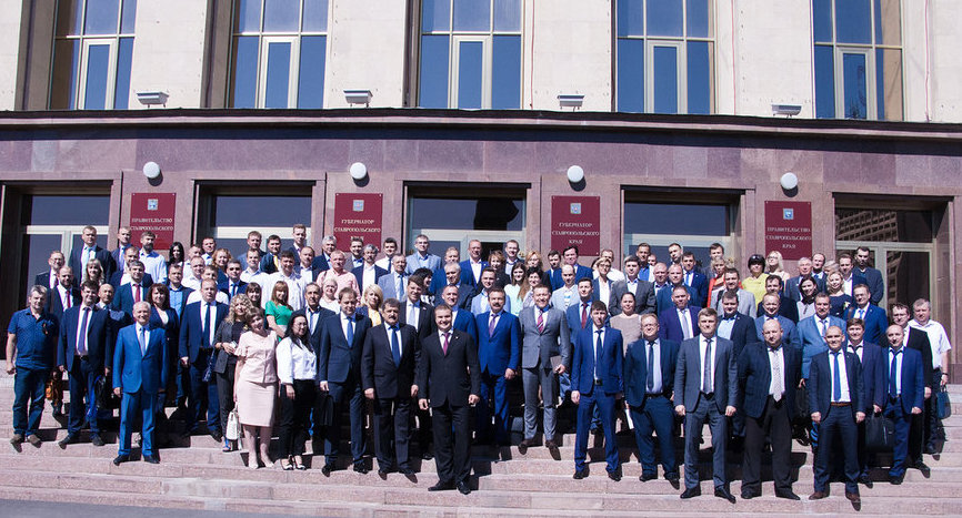 Всероссийское совещание в Ставропольском крае, май 2018 год.